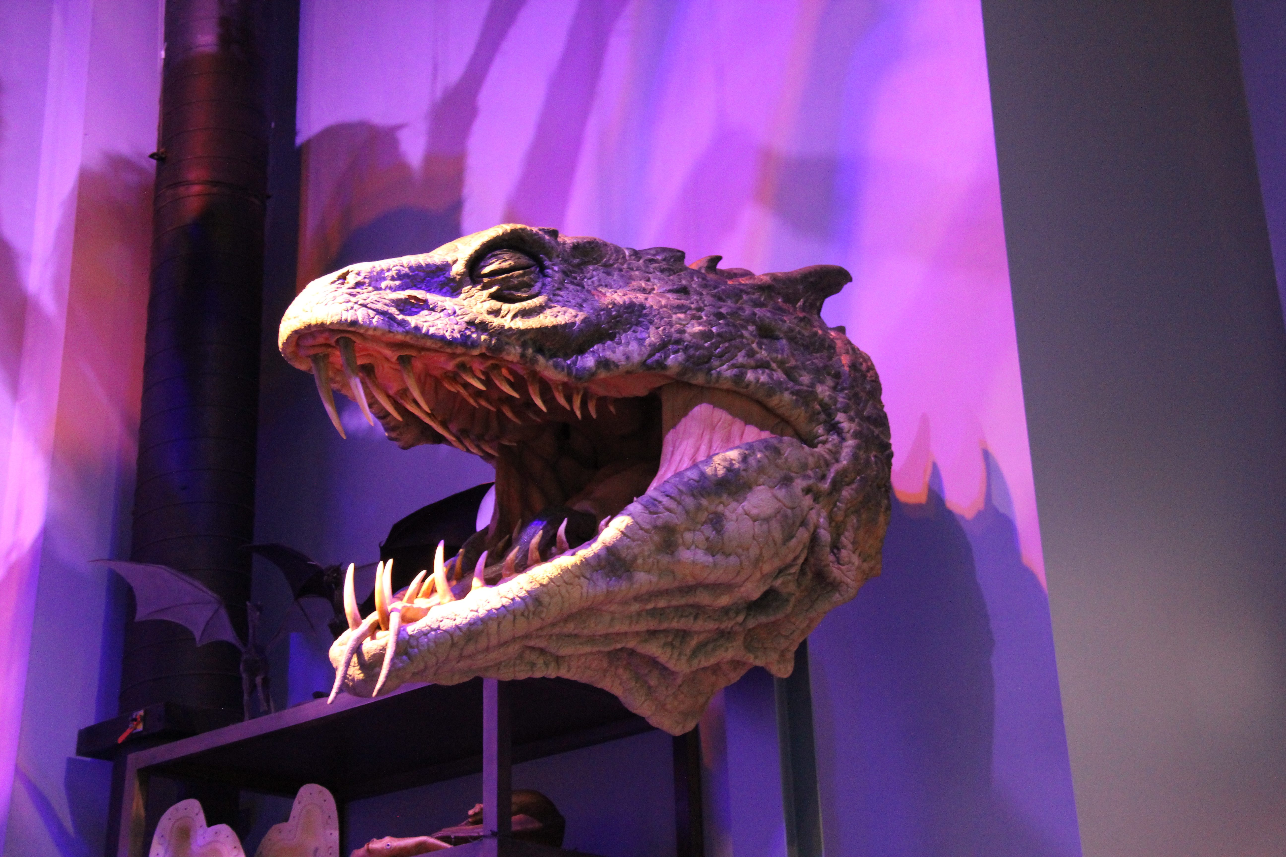 Basilisk Head